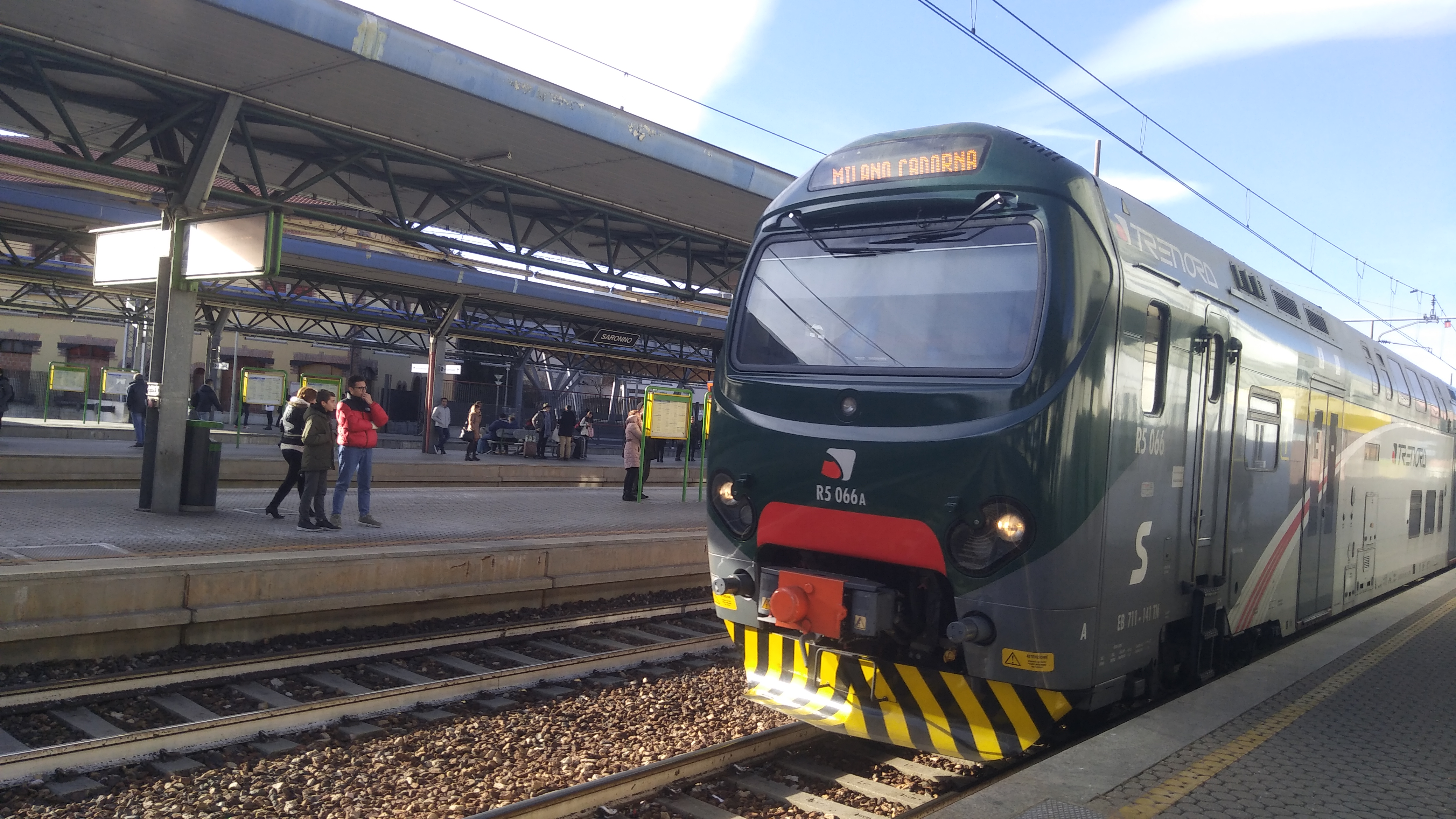 Treno TSR in livrea Trenord in direzione Milano Cadorna